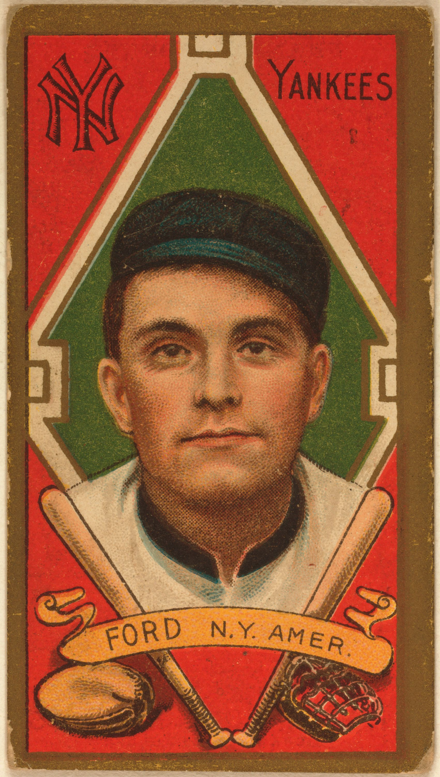 Russell Ford